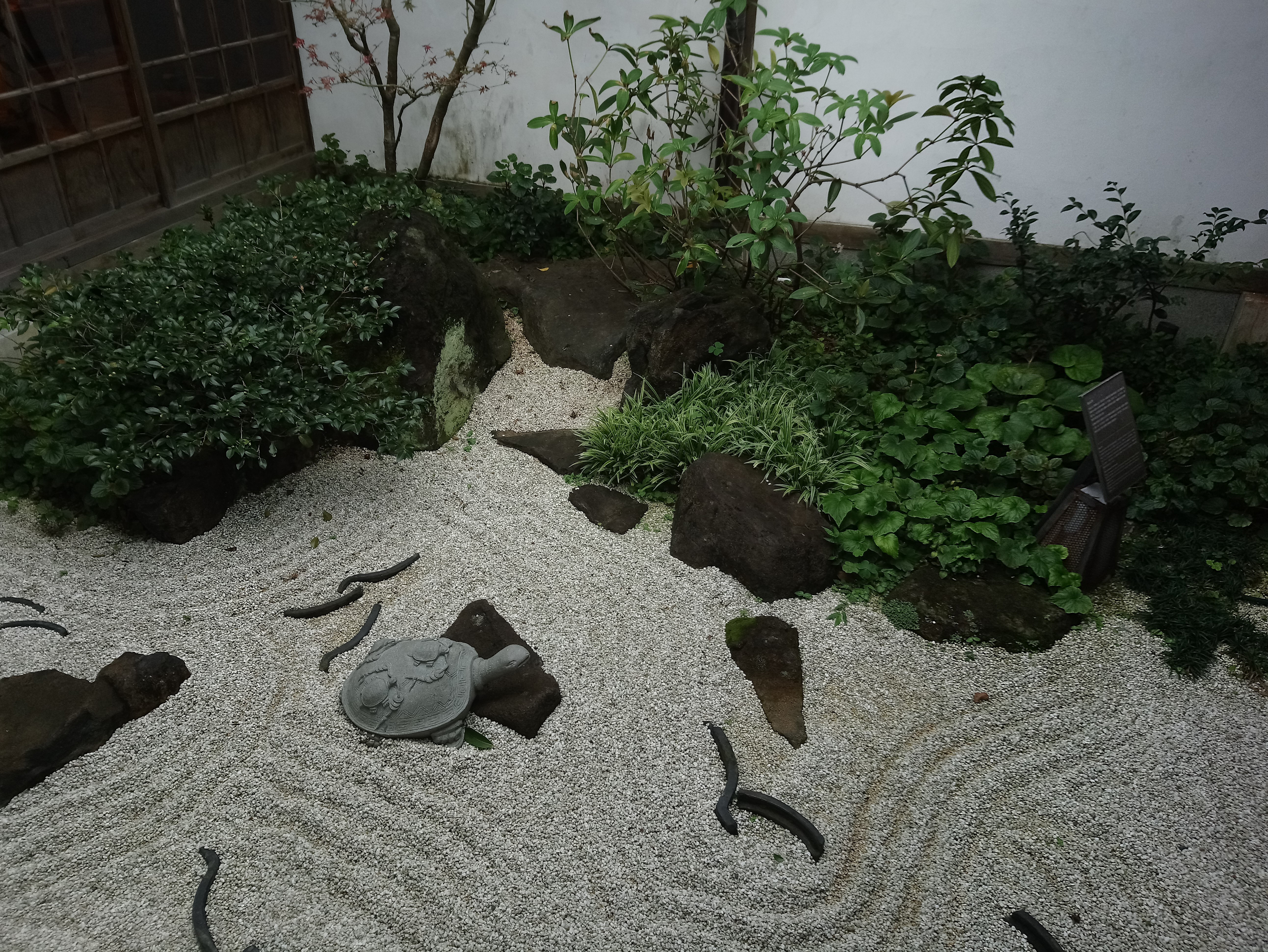 北投文物館枯山水－「水葉庭」，臺北市北投區新北投次分區林泉里